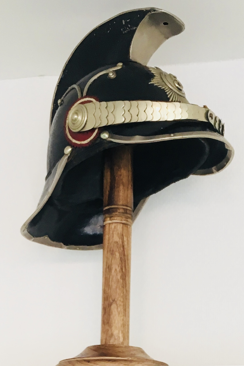 Sidste model af nysølvhjelme i det danske forsvar. M1901.